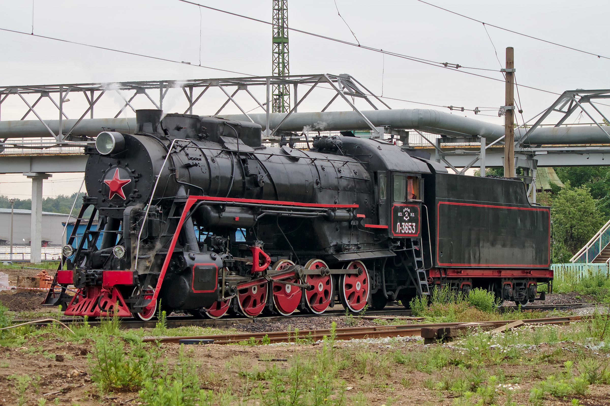 Л-3653, Москва, депо Подмосковная. см. фото 631860 в альбоме автора